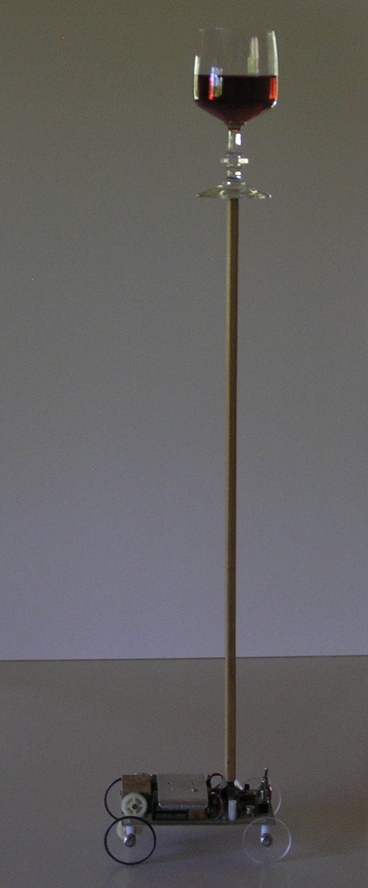 Inverted pendulum balancing cart